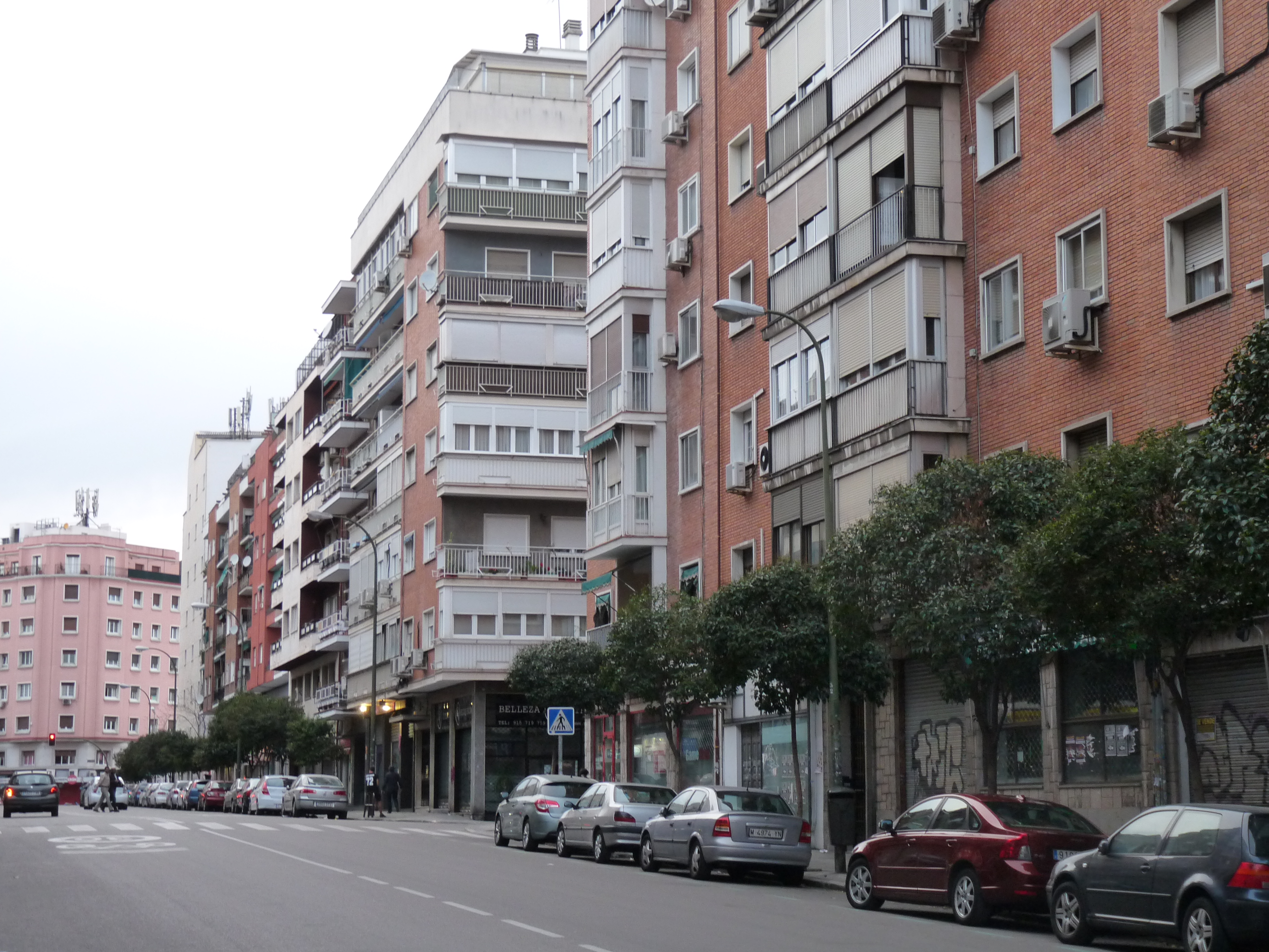 Calle del General Yagüe, Madrid, España.